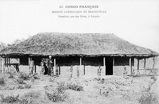 Mission catholique de Brazzaville : première case des Pères, à Linzolo. 116 cartes postales du Congo français, don 1907.